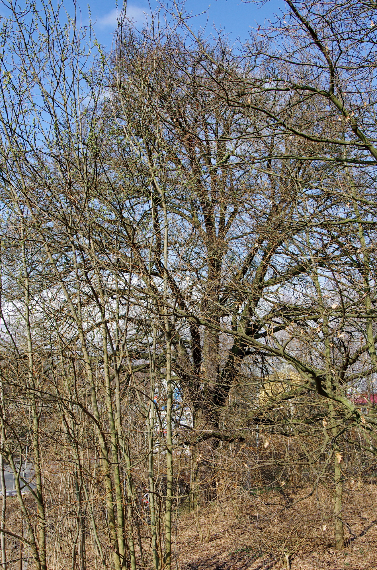 Památný strom - Dub pod rozvodnou - Karlovy Vary, místní část Drahovice